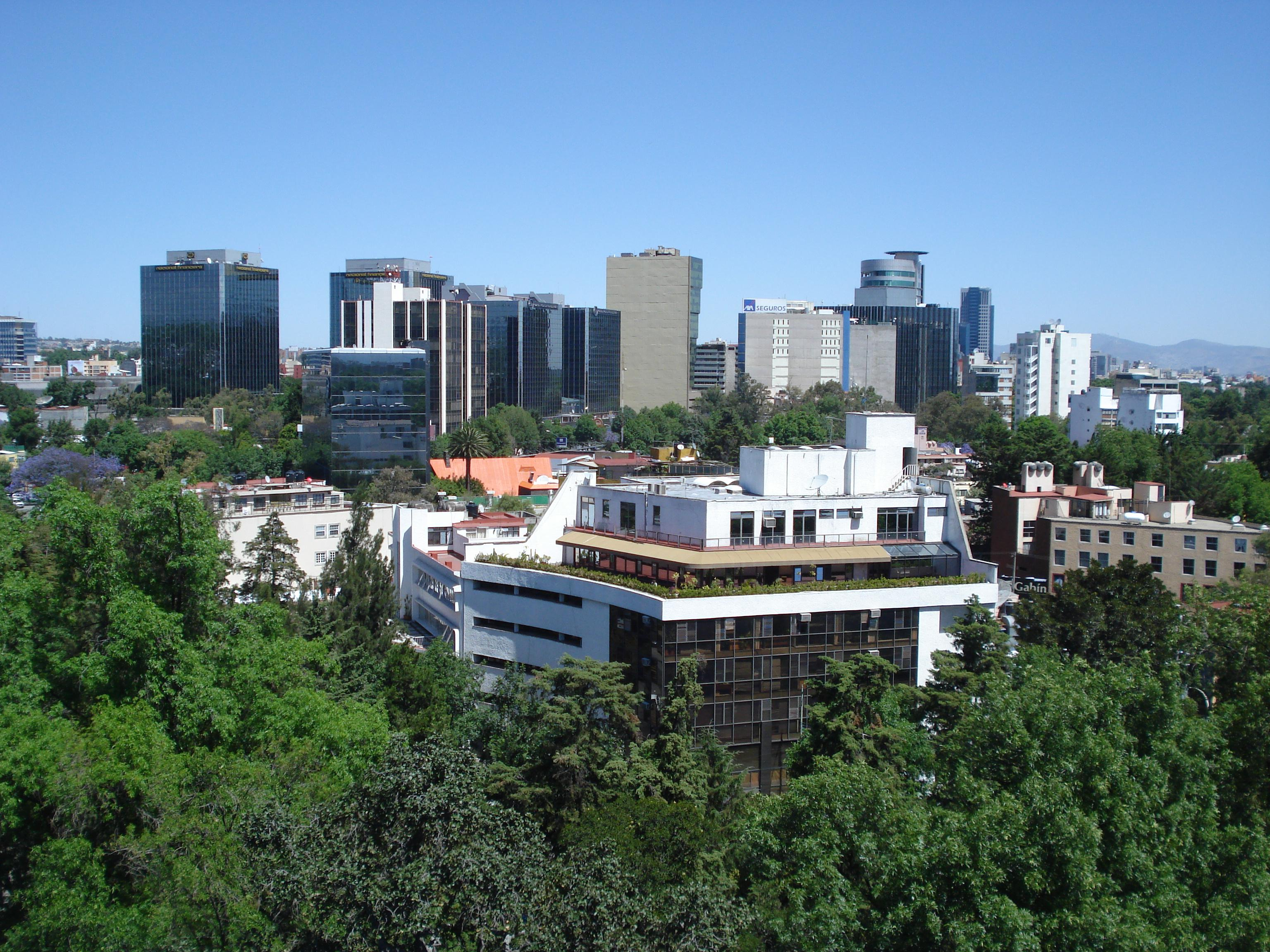 Ave. Insurgentes Sur, Ciudad de México Distrito Federal, México.